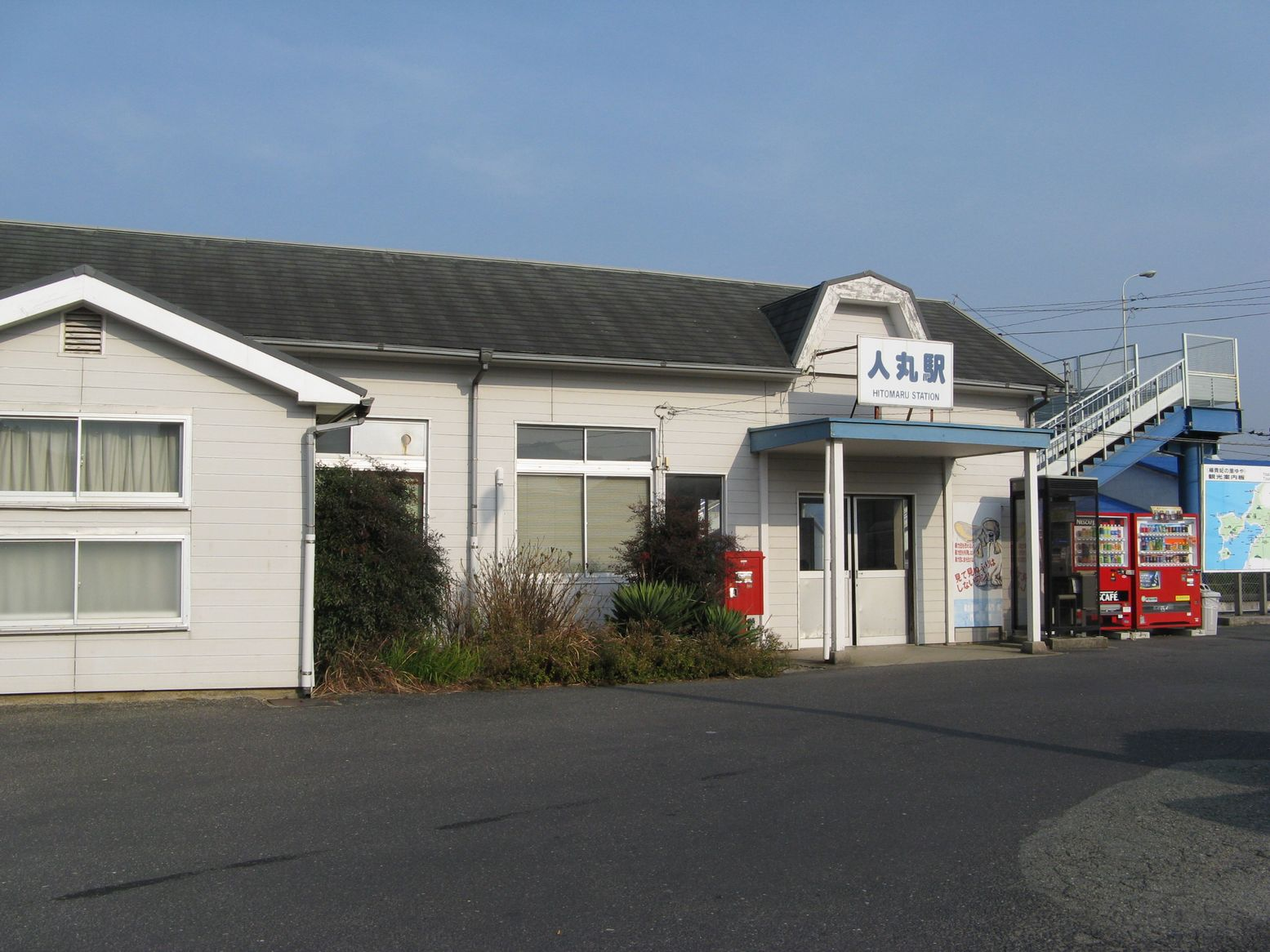 人丸駅 2008年1月10日 Bakkai撮影